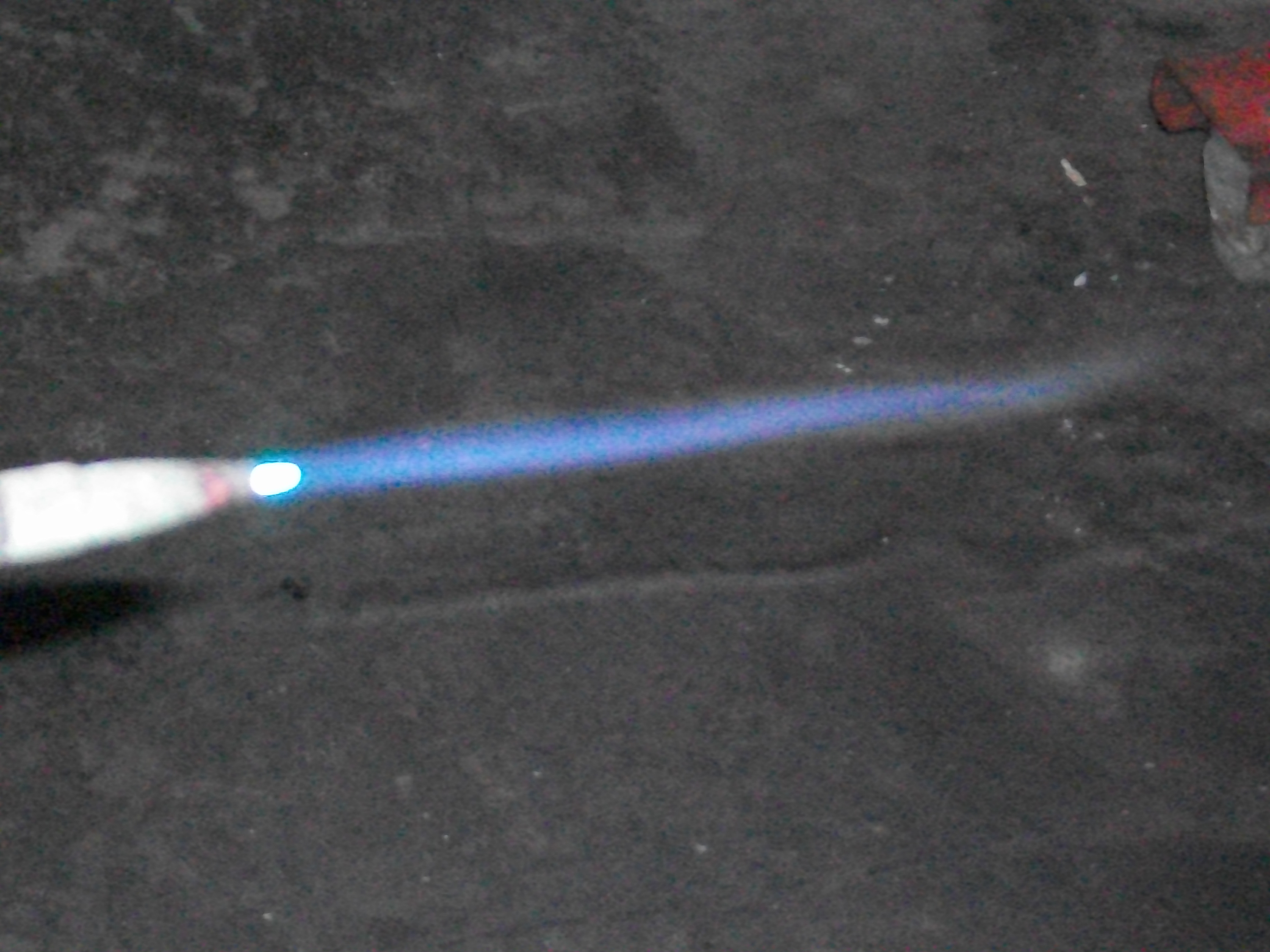 Imagen de la forma de la llama